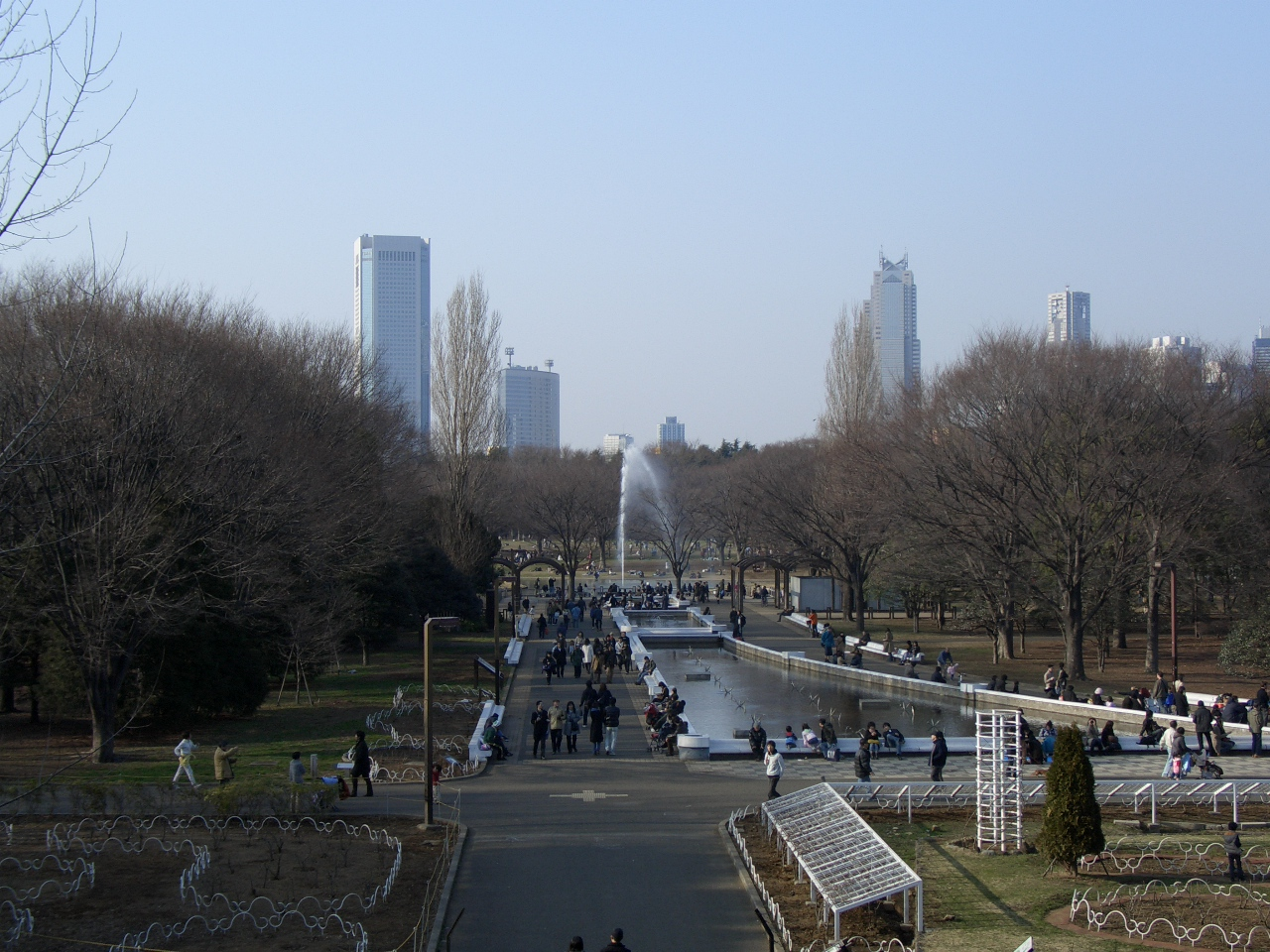 Yoyogi Park, Tokyo, Japan